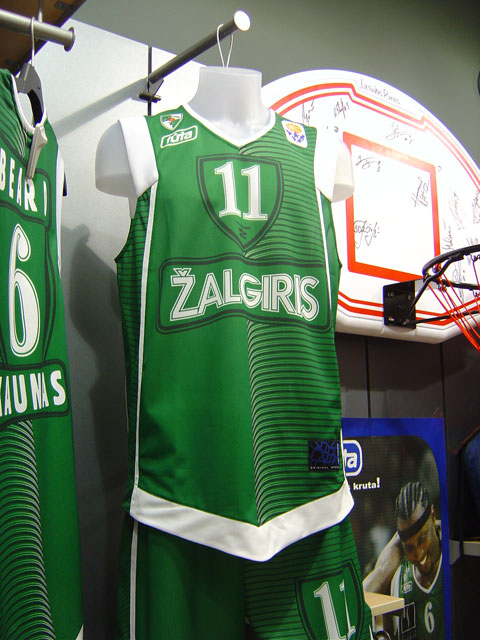 Foto på BC Zalgiris matchlinne för basketmatcher